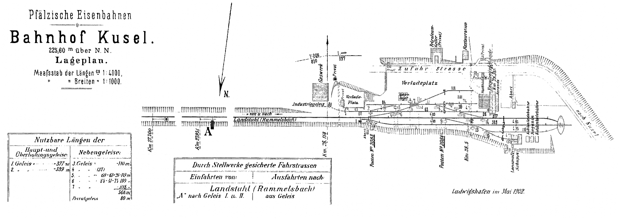 Gleisplan des Bahnhof Kusel 1902